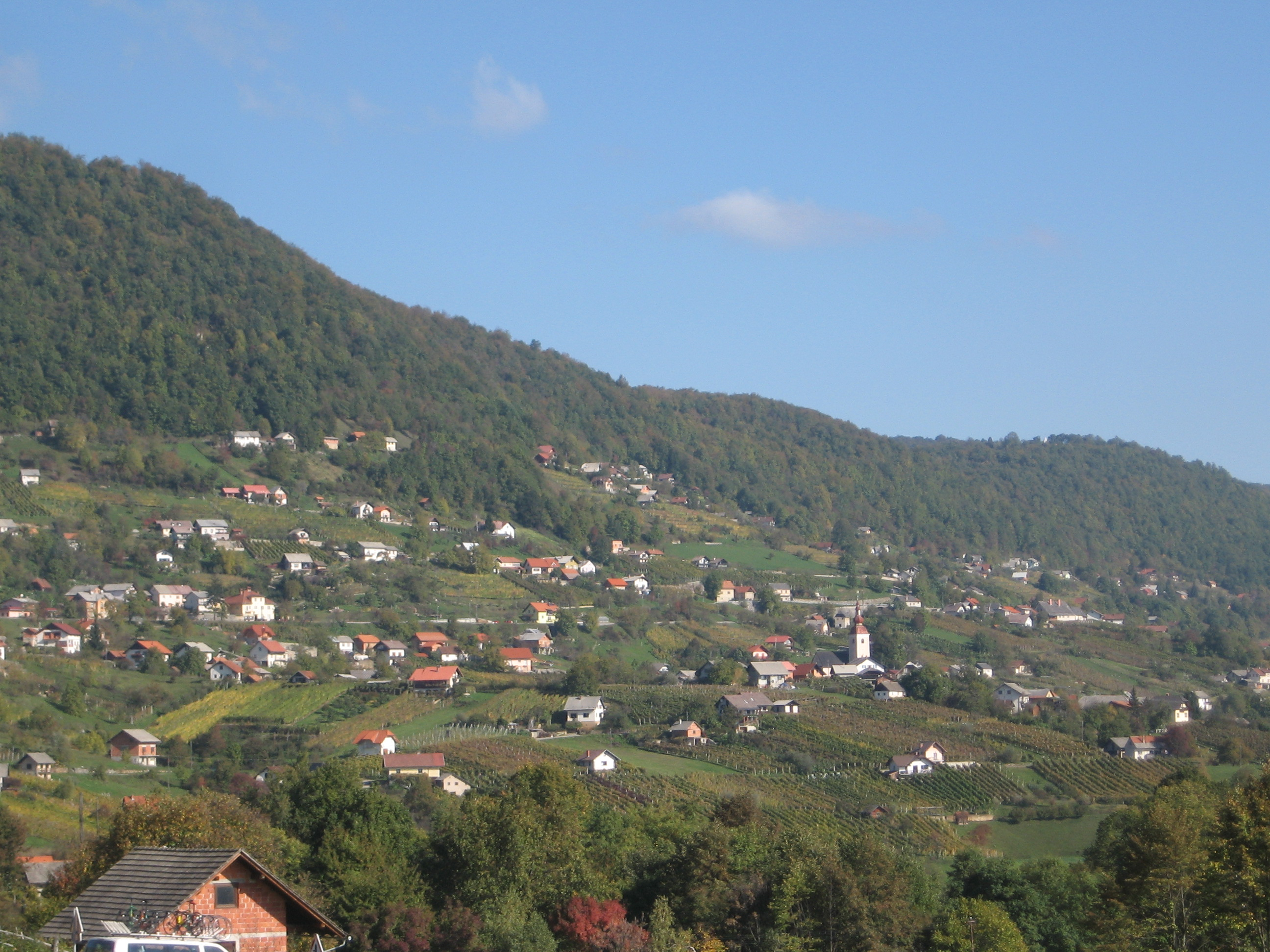 Bela krajina, Semič, Slovenia